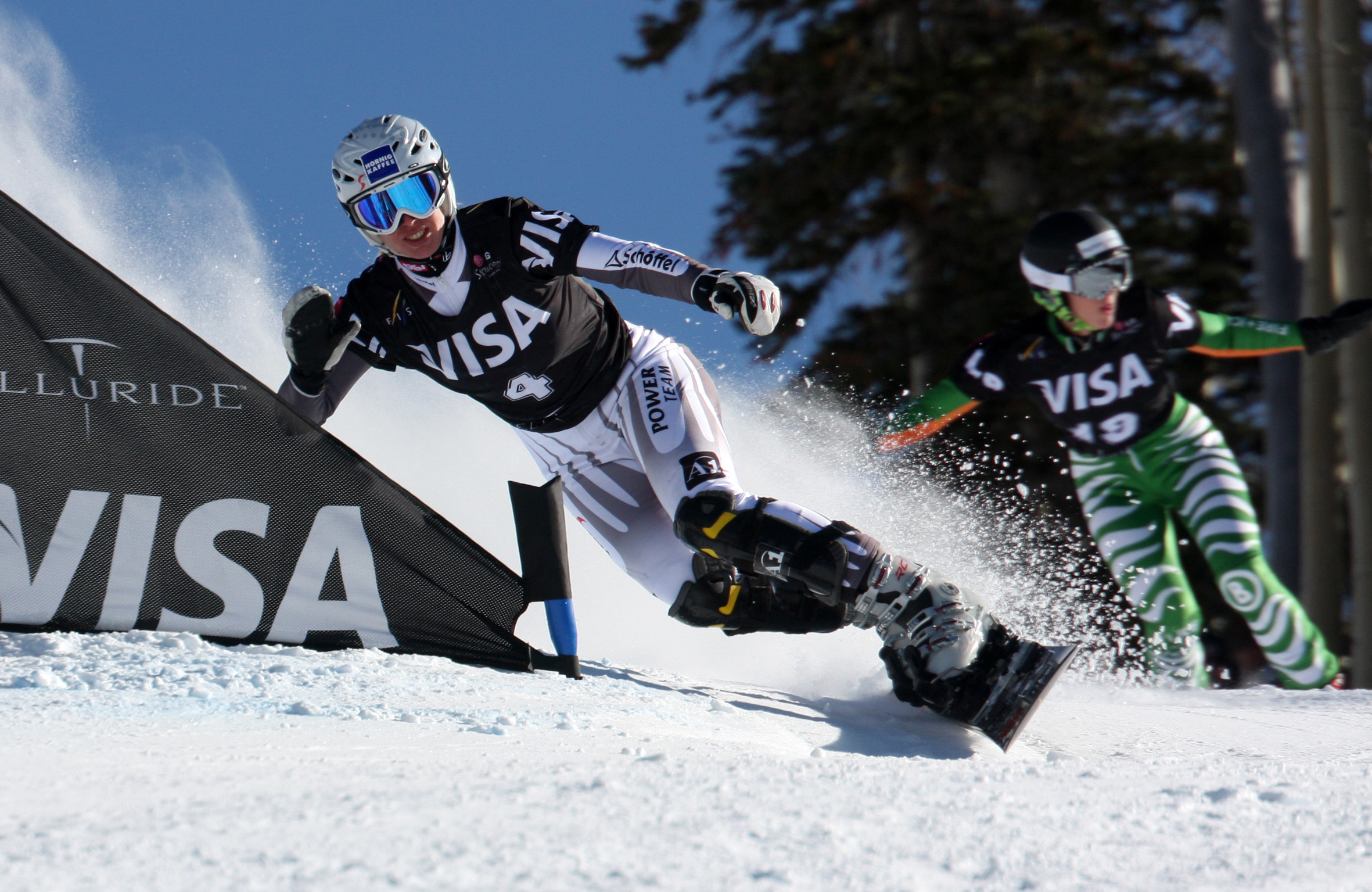 Telluride_PGS_Marion_Kreiner_AUT_vs_Isabella_Laboeck_GER